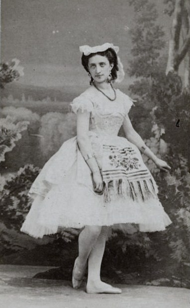 Ма́рфа Никола́евна Муравьёва (1838—1879)